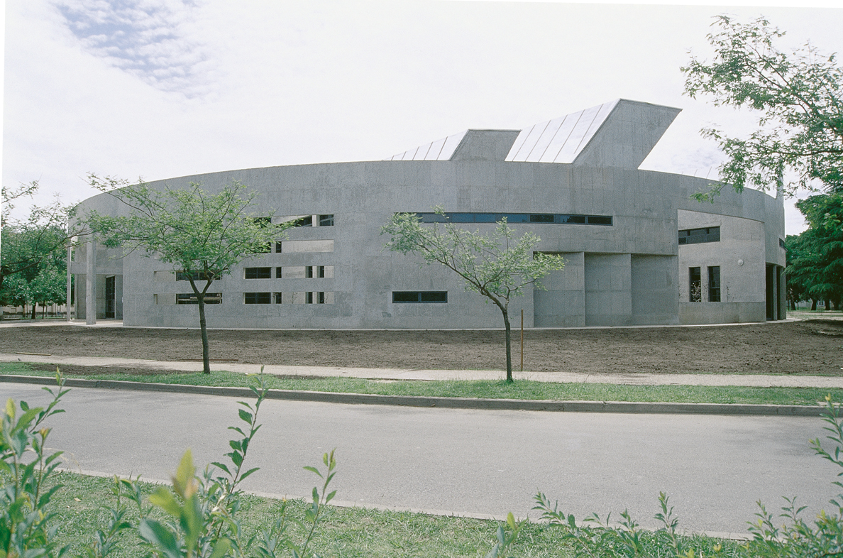 Escuela de Psicología, Ciudad Universitaria, Córdoba, Argentina